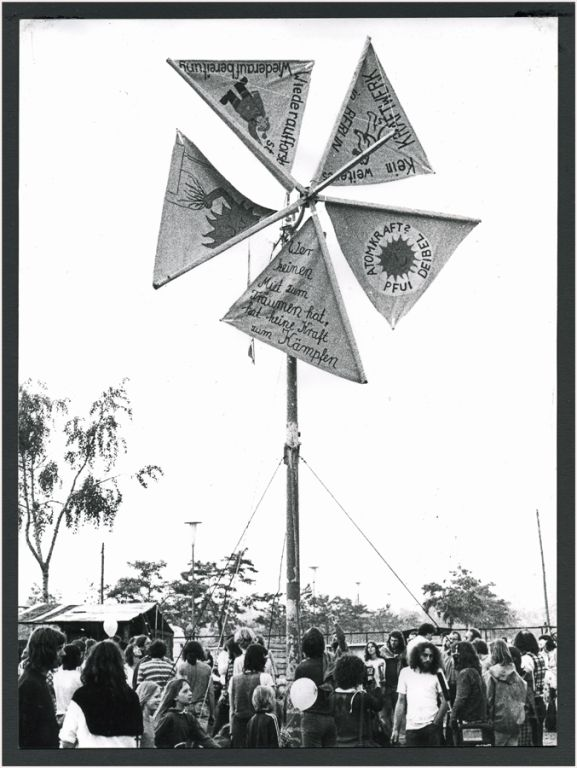 Windrad des Umweltfestivals am Funkturm in Berlin 1978. Plakatmotiv des Super8-Filmes „Wer keinen Mut zum Träumen hat, hat keine Kraft zum Kämpfen“, Medienwerkstatt Berlin.